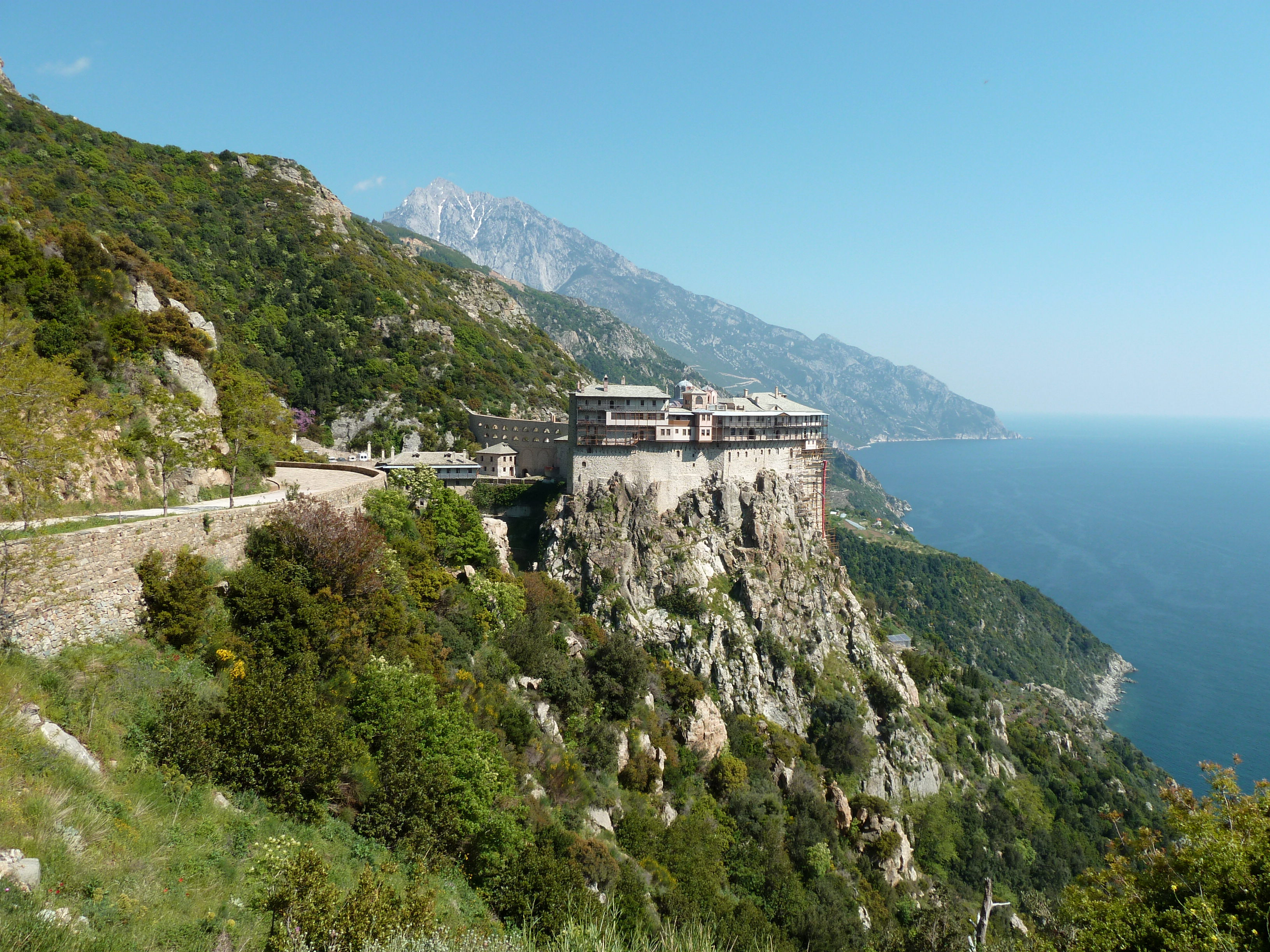 Vue sur le monastère de Simonos Petras (Mont Athos)